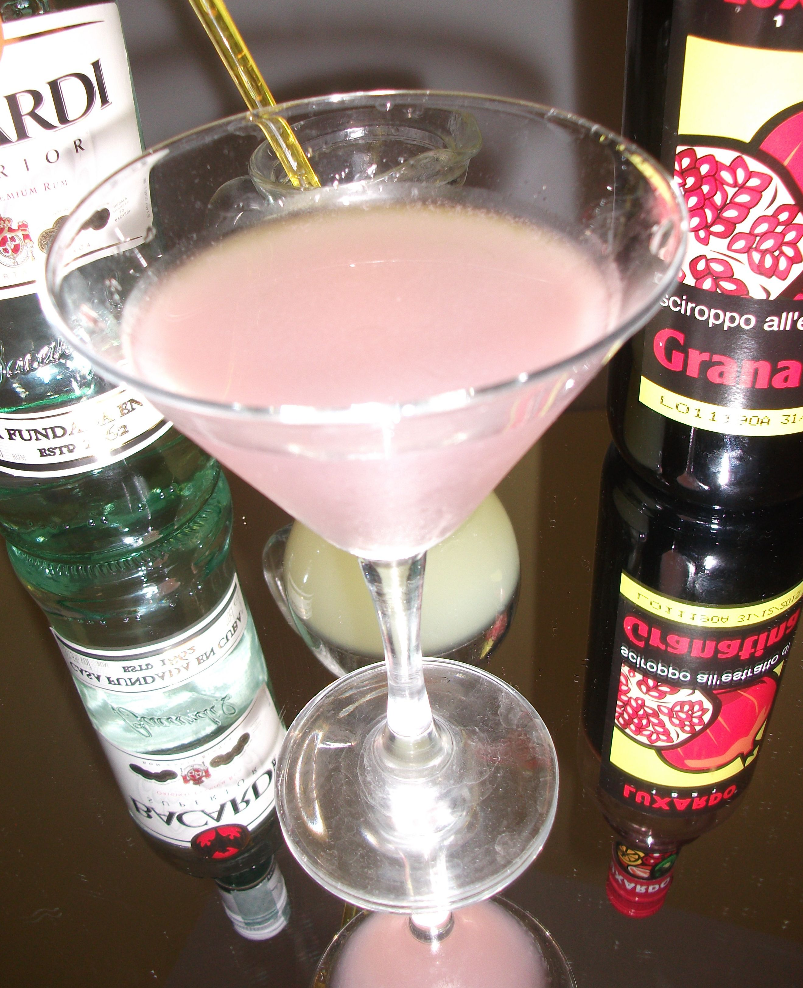 Il cocktail Bacardi con i suoi ingredienti